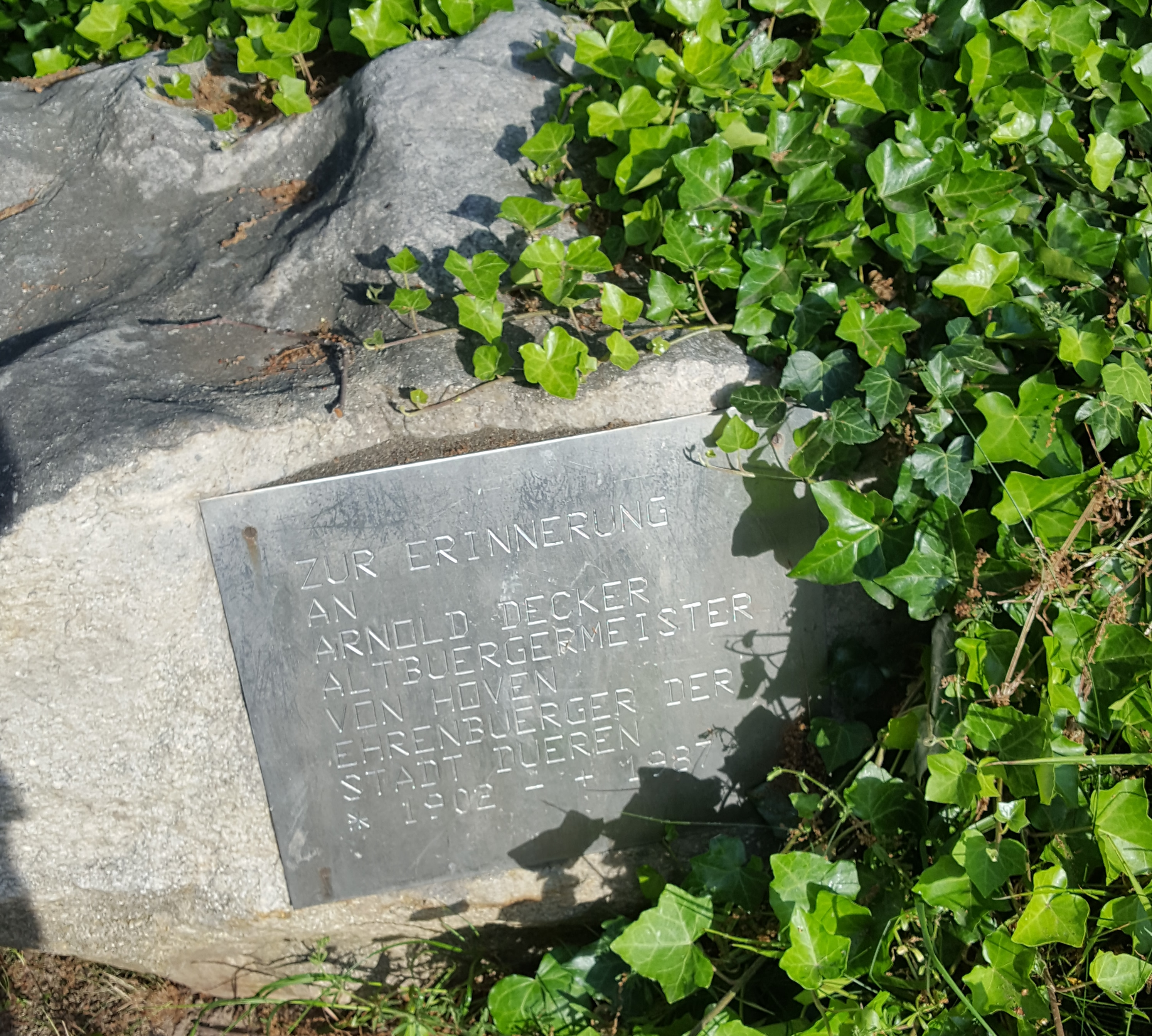 Der Gedenkstein von Arnold-Decker, mittlerweile leicht überwachsen.